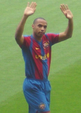 First day on Camp Nou (introduction) - Primer día en el Camp Nou (presentación)